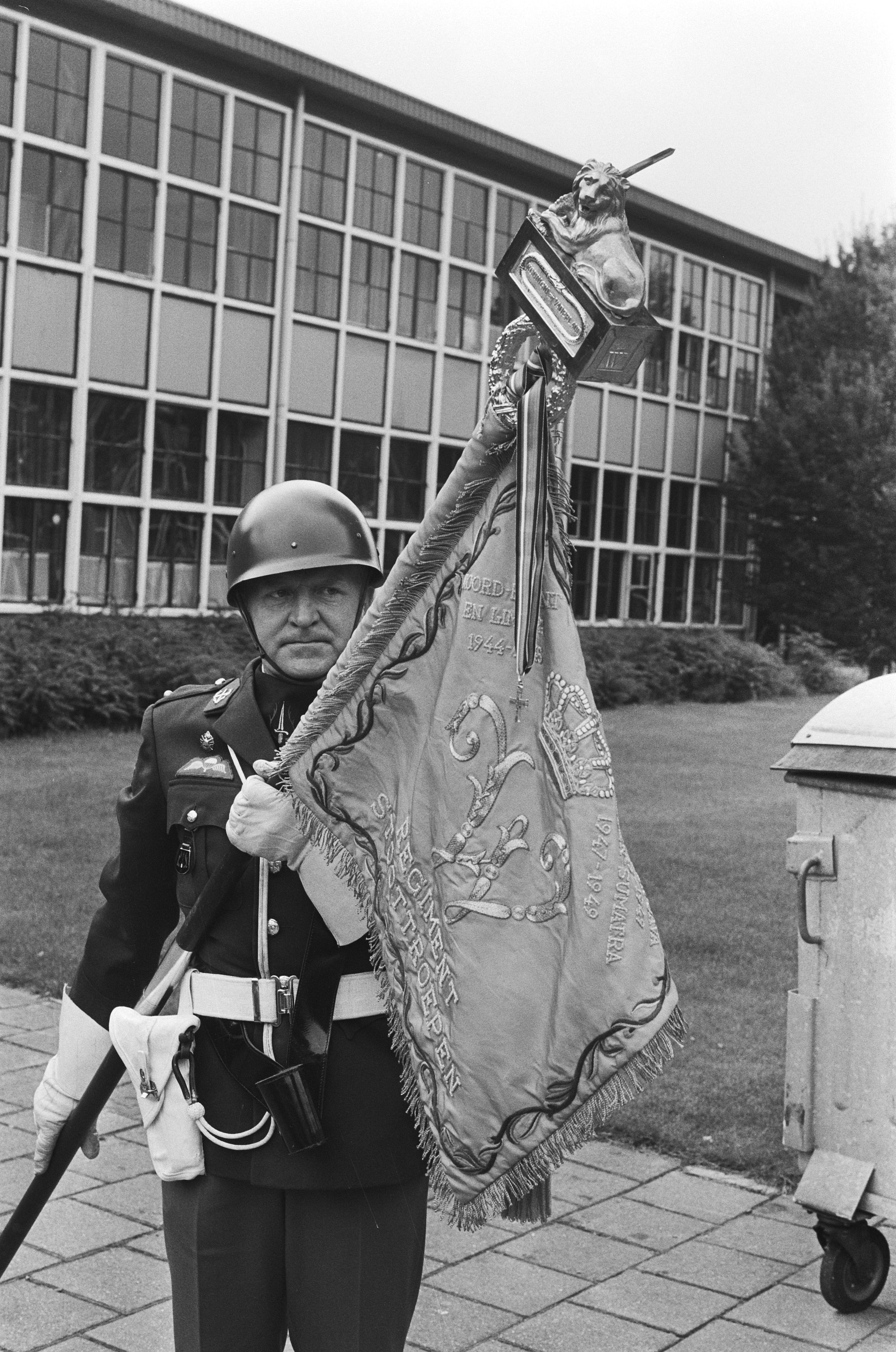 Collectie / Archief : Fotocollectie Anefo Reportage / Serie : [ onbekend ] Beschrijving : Koningin Beatrix reikt in Nunspeet het verzetsherdenkingskruis aan het Regiment Stoottroepen ; vaandeldrager Datum : 31 augustus 1982 Locatie : Nunspeet Trefwoorden : militairen, onderscheidingen, vaandels, vlaggen Instellingsnaam : Regiment Stoottroepen Prins Bernhard Fotograaf : Croes, Rob C. / Anefo Auteursrechthebbende : Nationaal Archief Materiaalsoort : Negatief (zwart/wit) Nummer archiefinventaris : bekijk toegang 2.24.01.05 Bestanddeelnummer : 932-3033 Reacties Geplaatst door Henk Ras op 11 december 2004 - 17:49. Volgens mij zijn deze foto's genomen in Ermelo op de Genraal Spoor kazerne, en niet in Nunspeet, zoals het bijschrift meld. Ik meen de ... Ebbink te herkennen als de vaandeldrager.